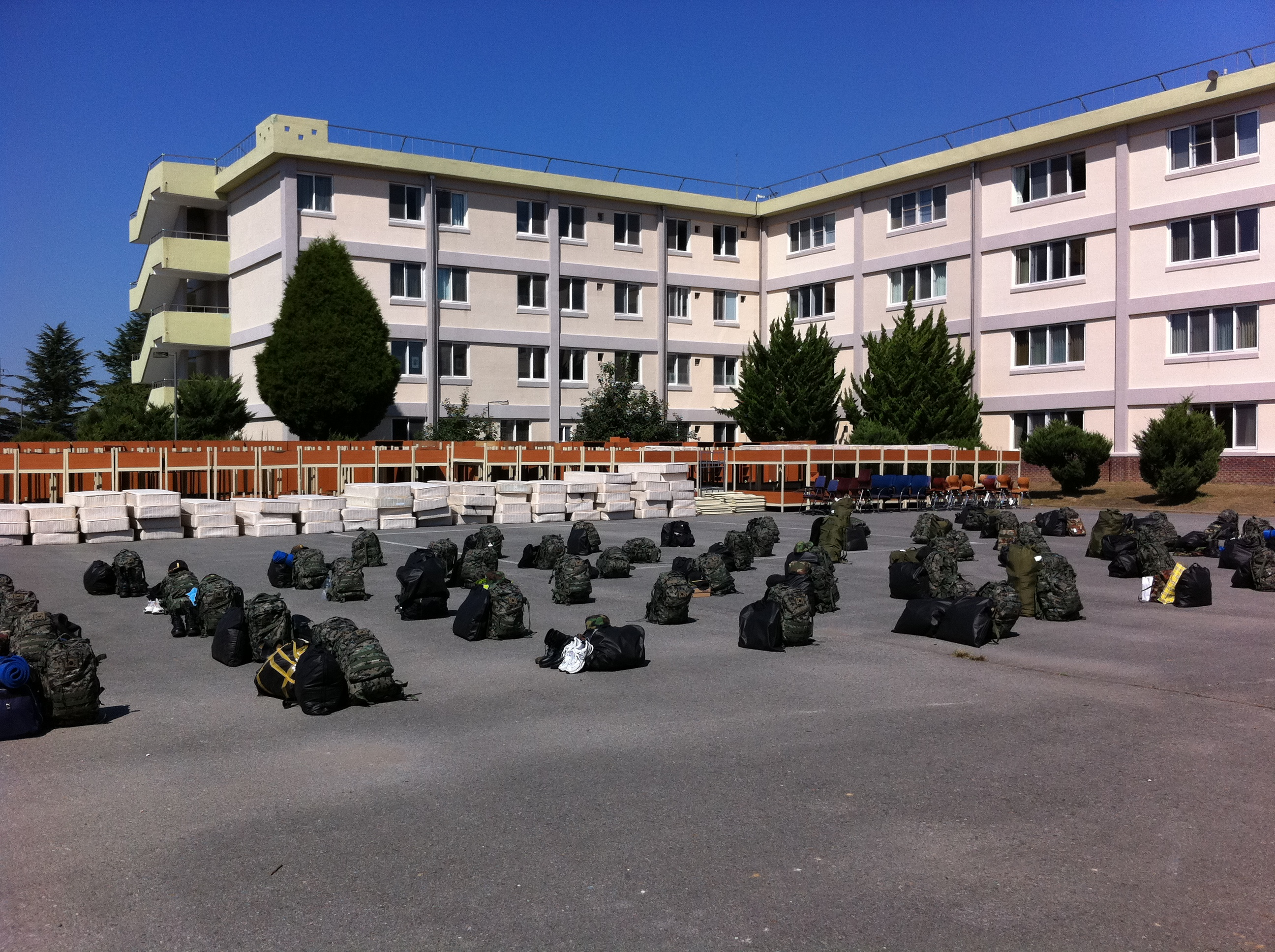 3사관학교 #1 내무실 건물